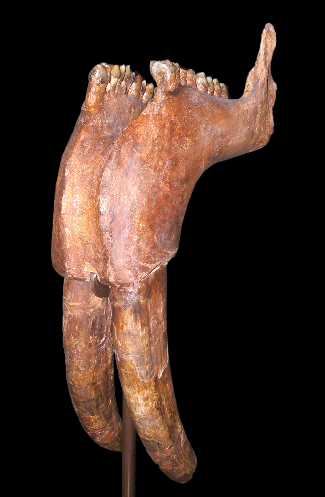 Naturhistorisches Museum Wien (Franzensbad P. bavaricum)